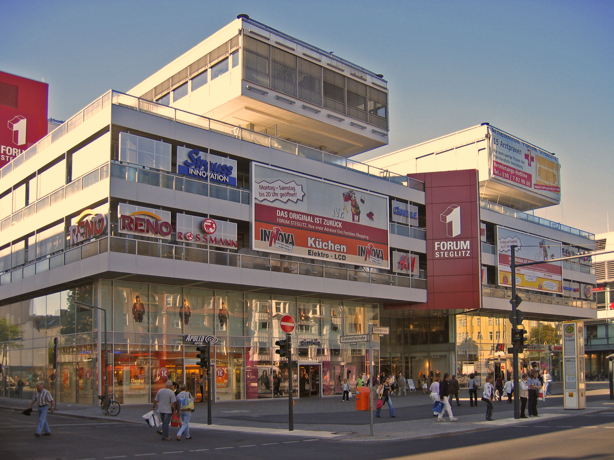 Forum Steglitz, Schloßstraße